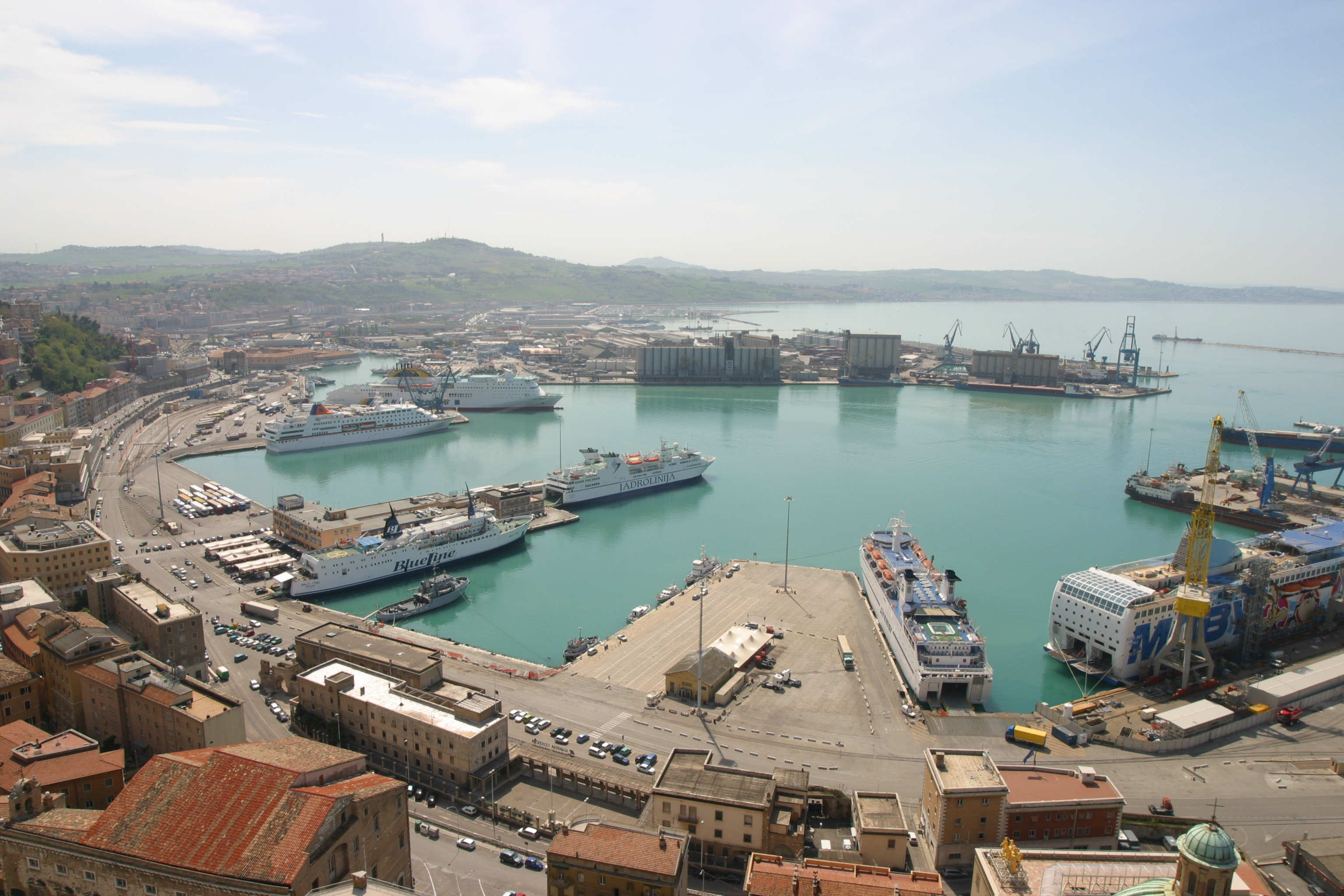 Veduta del porto di Ancona